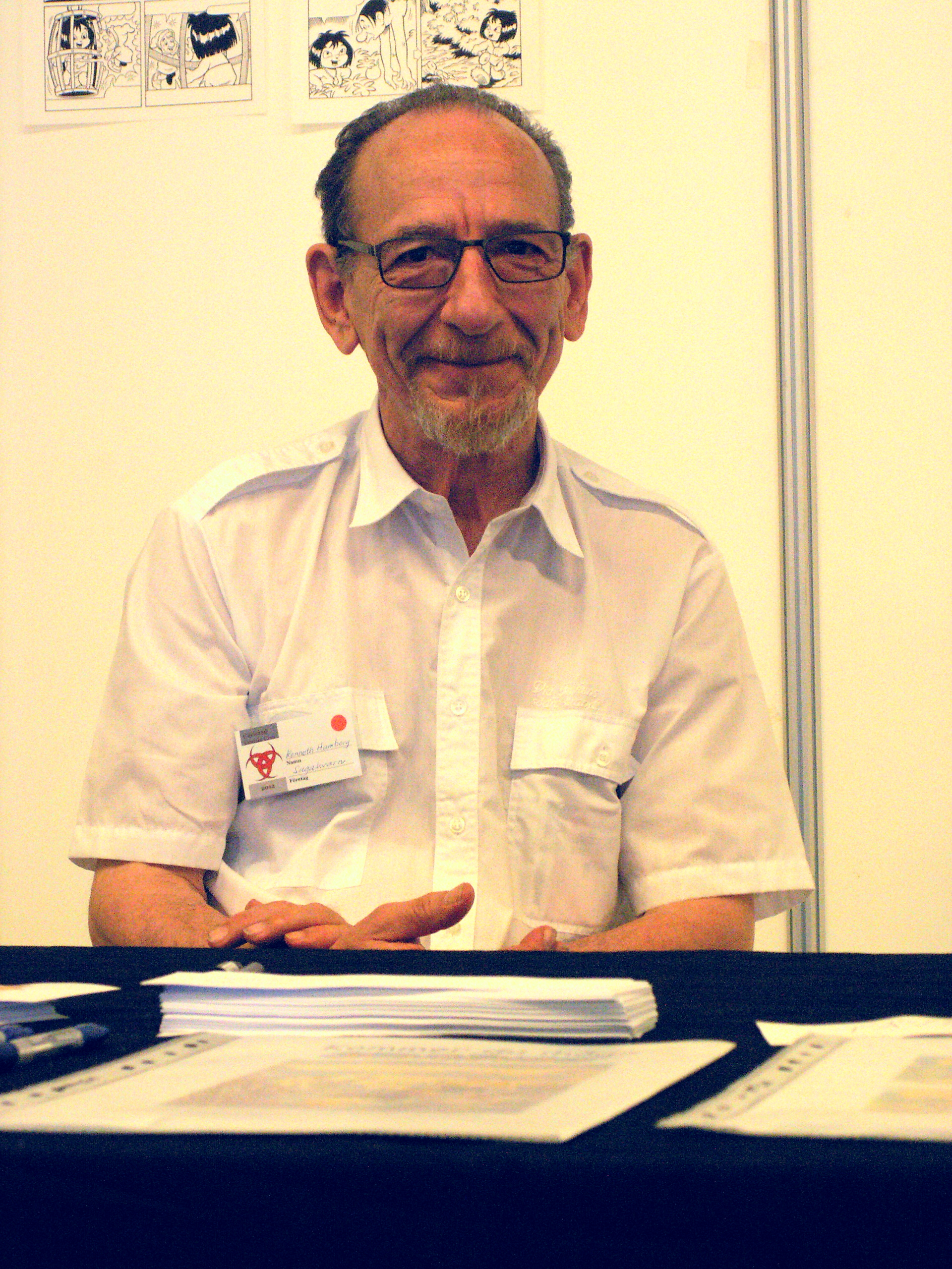 Kenneth Hamberg, på seriefestivalen Carlstad Comic Con maj 2012. Han har sedan 1970-talet arbetat med den tecknade serien Goliat samt på senare år även med Bamse.